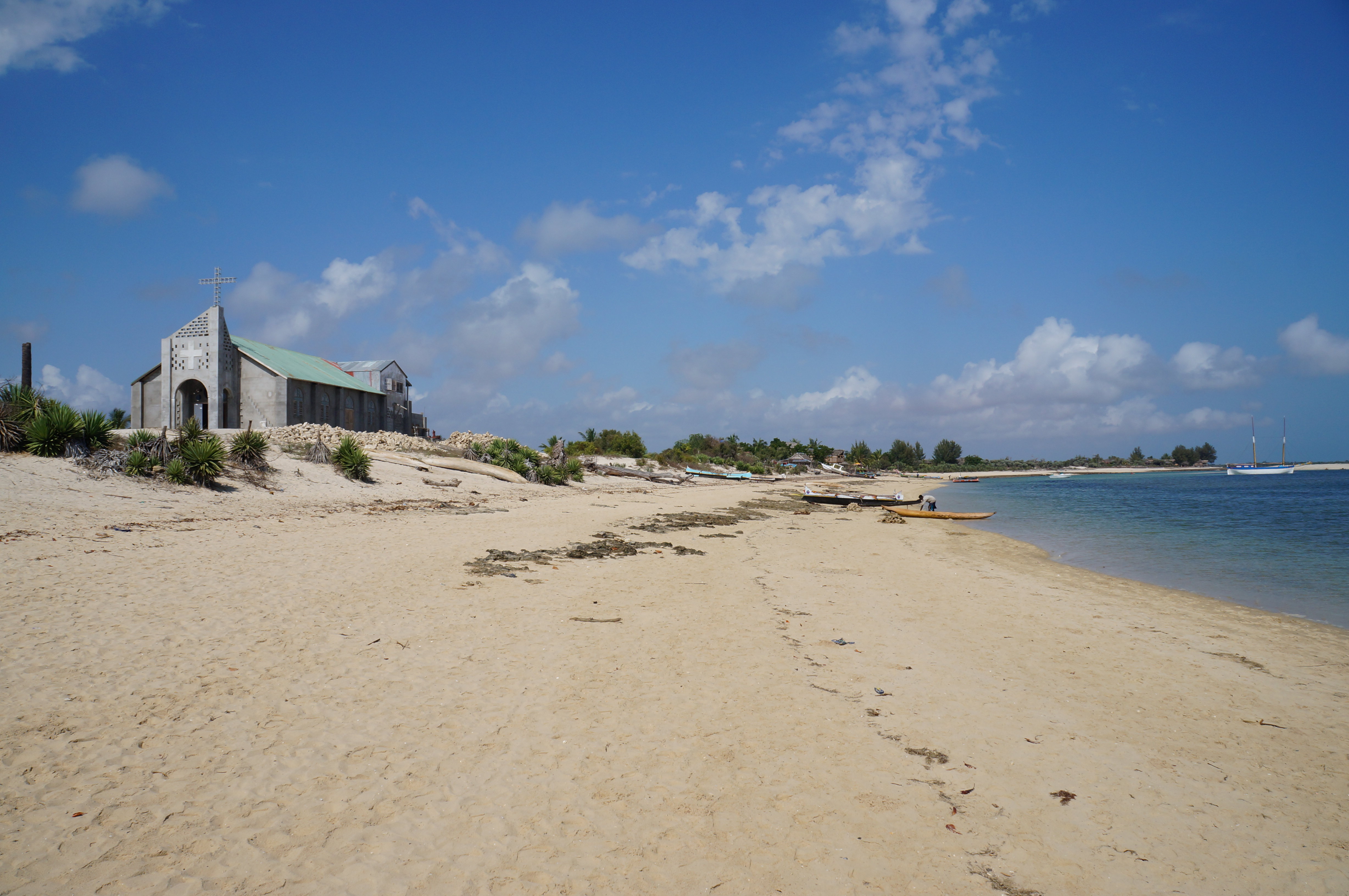 Eglise à Belo sur Mer - Madagascar